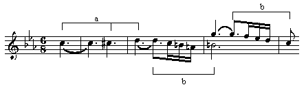 GNU-FDL, selbst erstellt